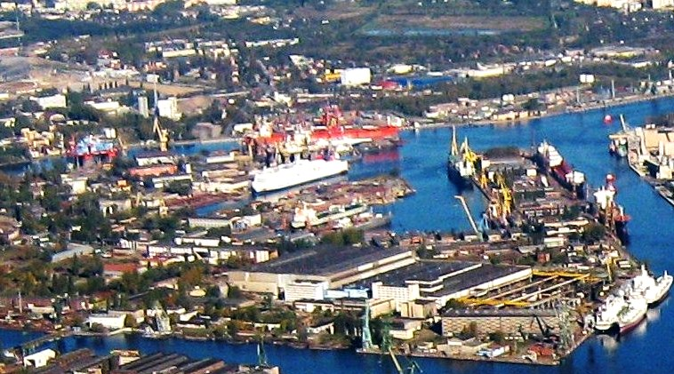 Ausschnitt aus dem Foto Gdańsk_Młode_Miasto.JPG